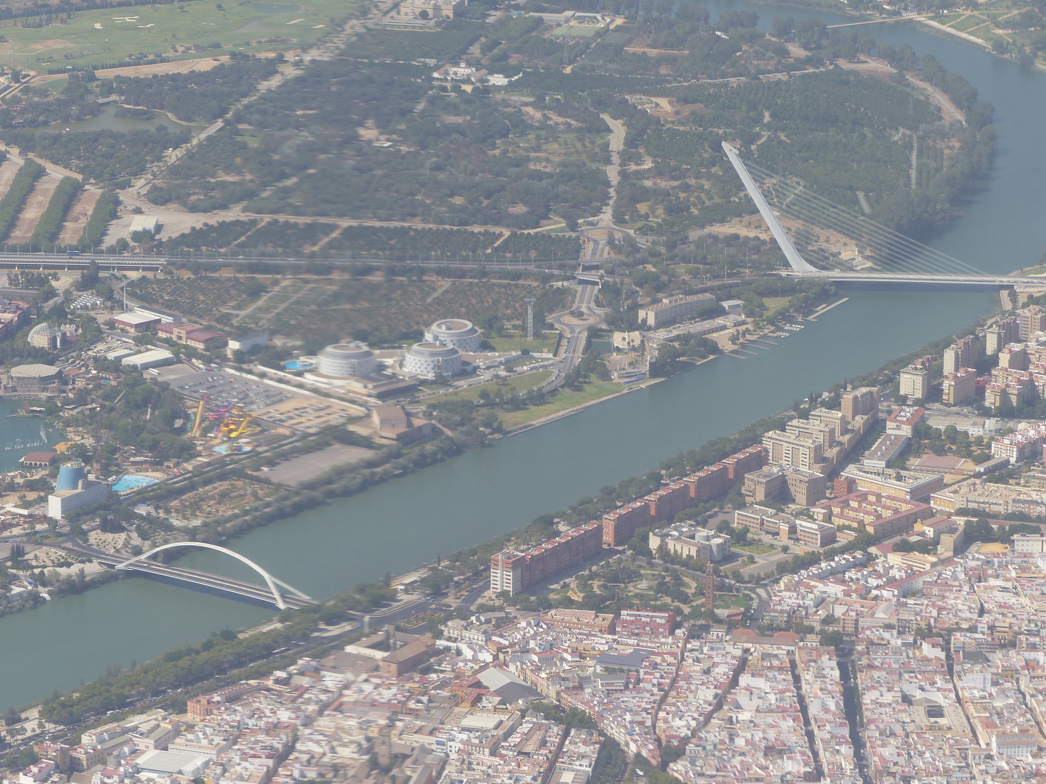 Guadalquivir en Sevilla, Barqueta y Alamillo, Sevilla, España, 2015